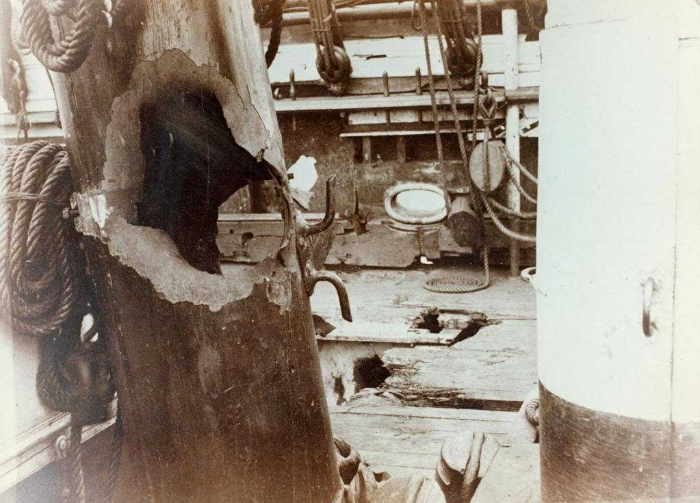 Avería del buque chileno Abtao: El 28 de agosto de 1879 la corbeta Abtao combatió con el Huáscar en la rada de Antofagasta. La imagen muestra los daños que sufrió la embarcación chilena en el palo mayor y la cubierta, luego de recibir un proyectil que le lanzó el monitor peruano. En la batalla perecieron cuatro marinos y un ingeniero chileno. ( REPOSITORIO DIGITAL Archivo Histórico de la Armada de Chile Destrozos causados en la corbeta Abtao por un proyectil del blindado peruano Huáscar durante el combate de Antofagasta del 28 de agosto de 1879. Siguiendo el parte oficial del comandante del buque chileno, capitán de fragata Aureliano Sánchez Alvaradejo, los daños de la imagen corresponden al impacto de un segundo proyectil, que penetró por la banda de estribor, atravesando el palo mayor de parte a parte y explotó en el combés, por babor, destrozando parte de la cubierta y matando a cuatro tripulantes e hiriendo a cinco de gravedad. Fuente: Colección Chantal Roberts. Fotografía original de la época.